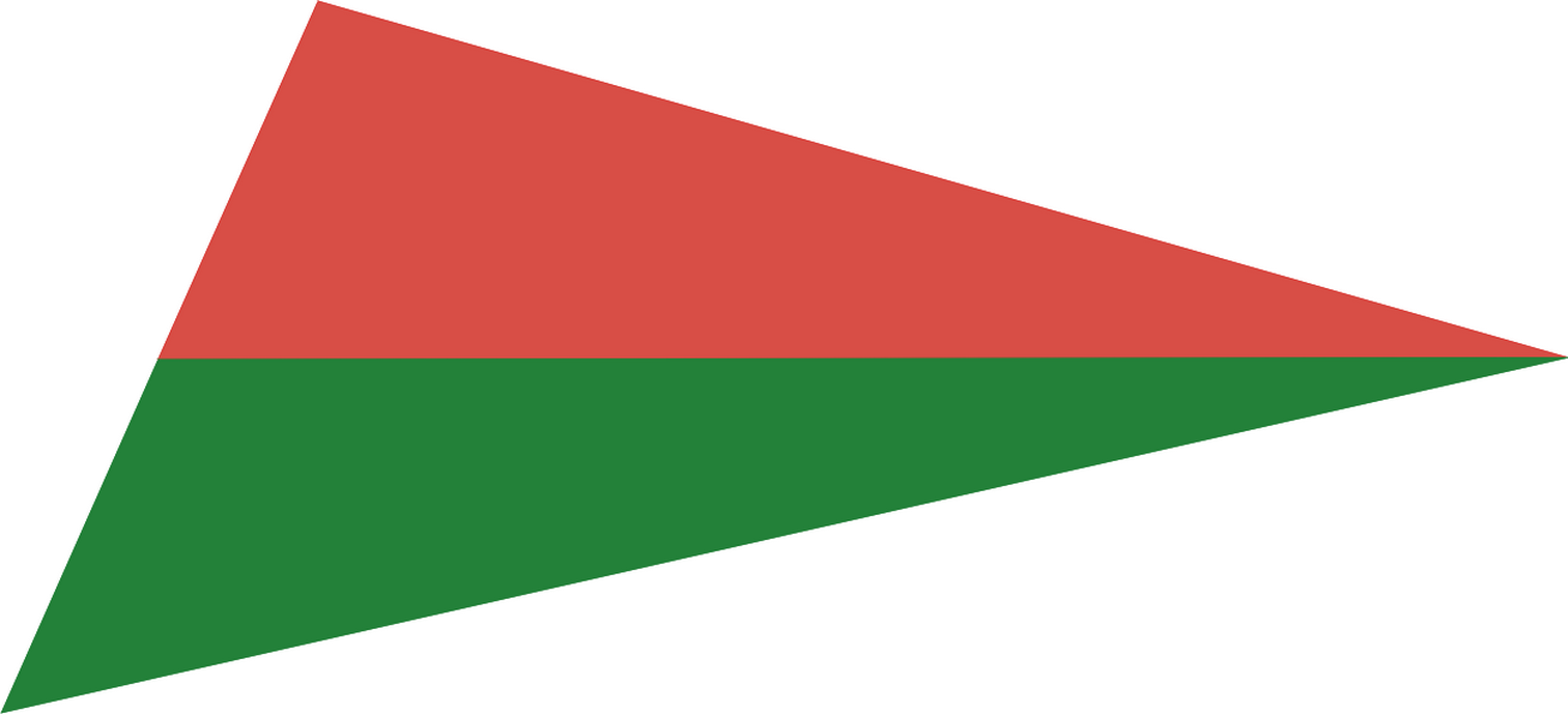 LWP - barwy broni na kołnierze kurtek obowiązujące od stycznia 1945 - artyleria ciężka